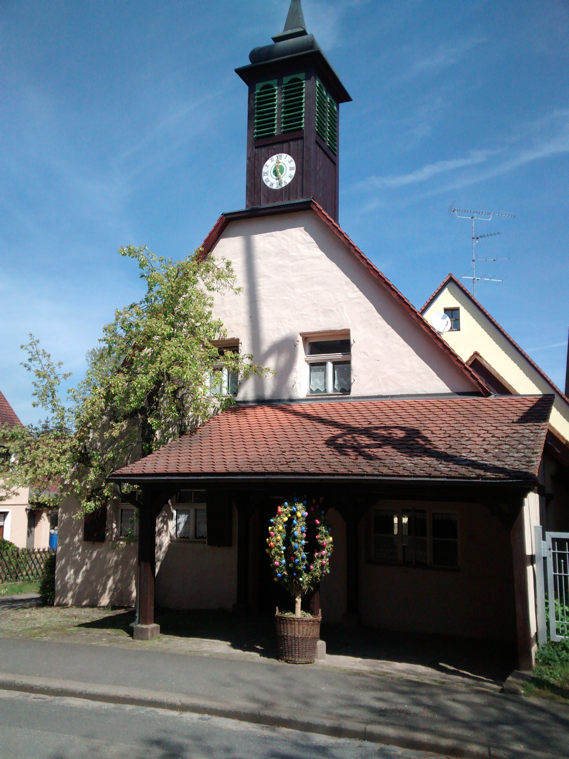 Ehem. Schmiede in Fernabrünst